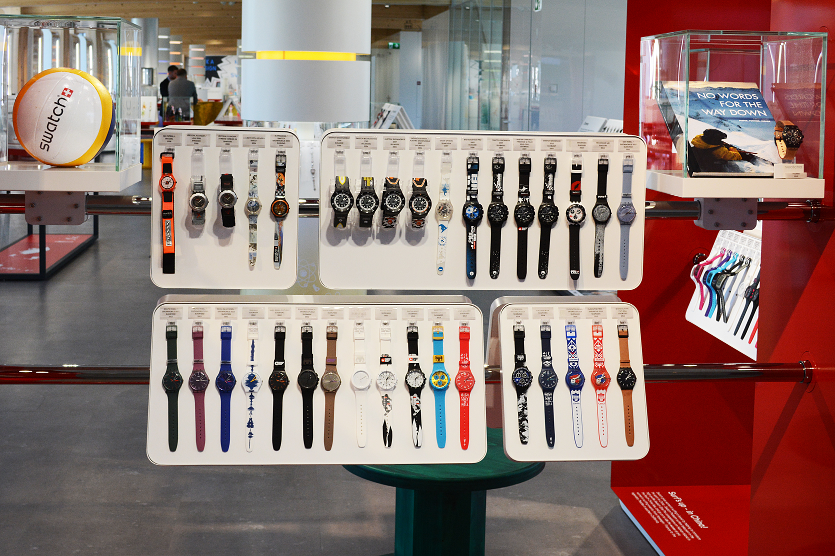 Teilansicht der Uhrenkollektion im 2019 neu eröffneten Swatch Museum Biel.